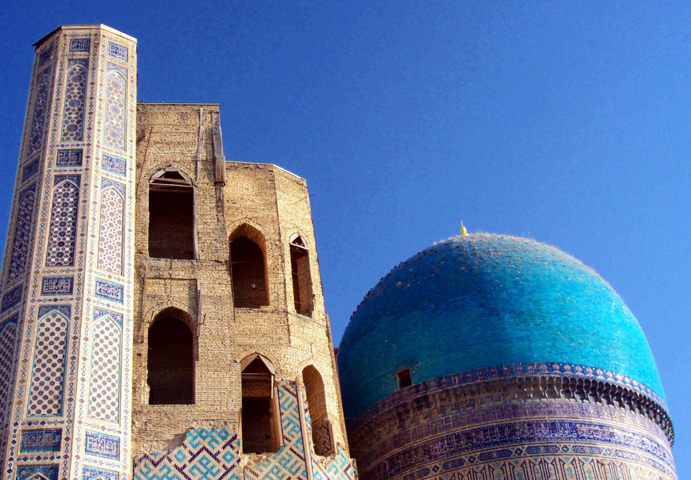 Bibi Khanum Mosque, Samarkand